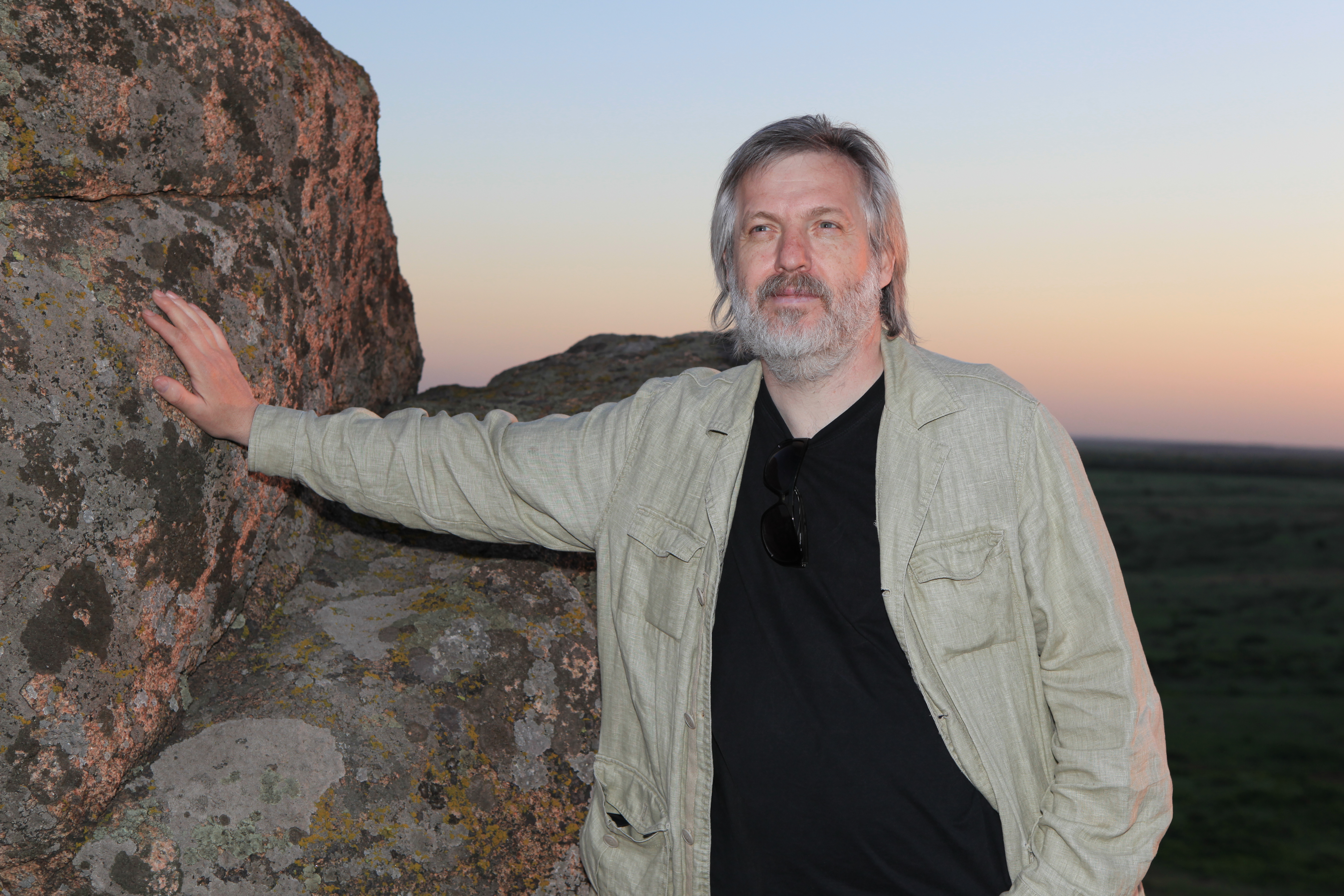 Каменные могилы